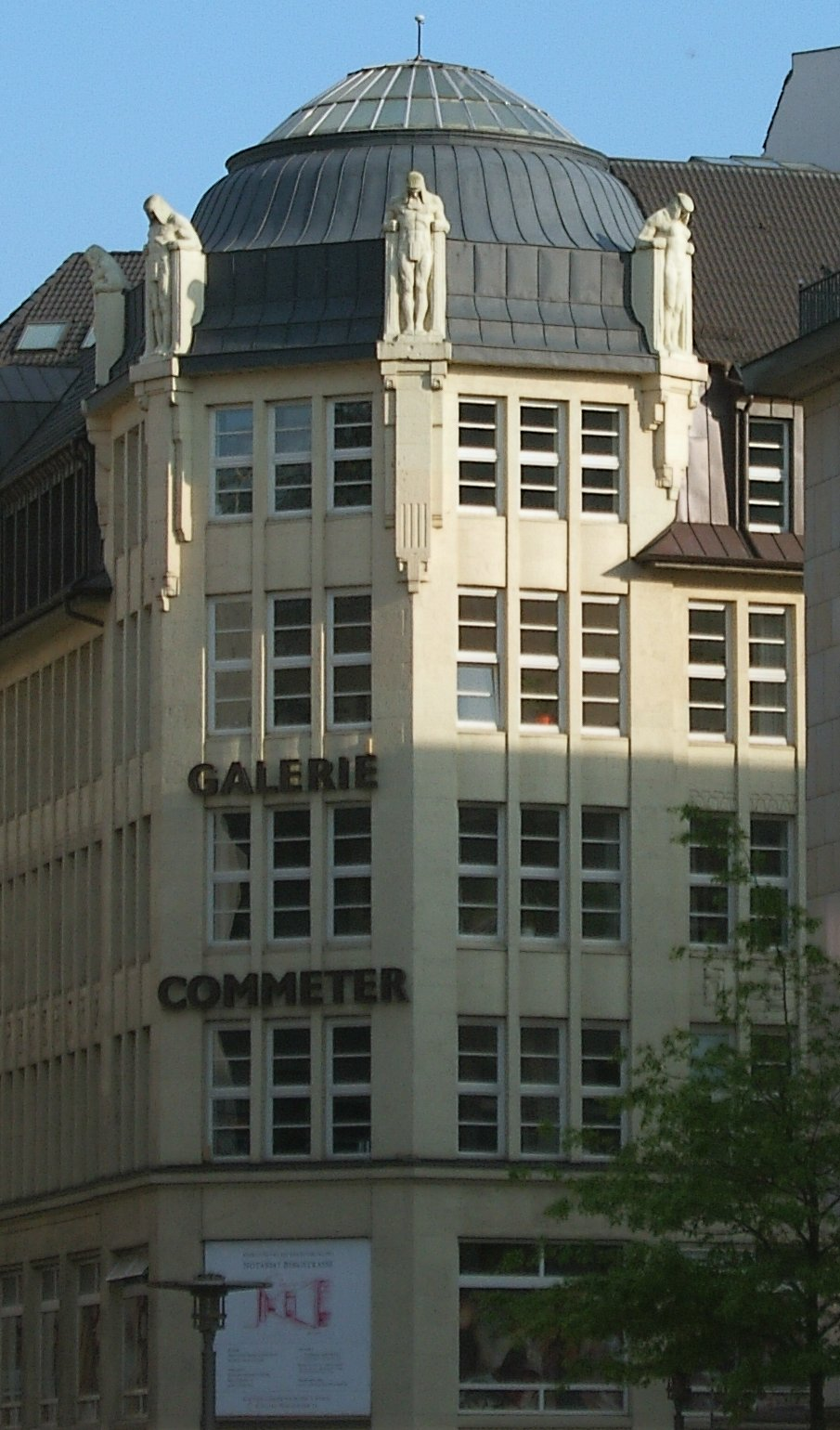 Galerie Commeter in der Hermannstraße, Ecke Bergstraße in Hamburg-Altstadt